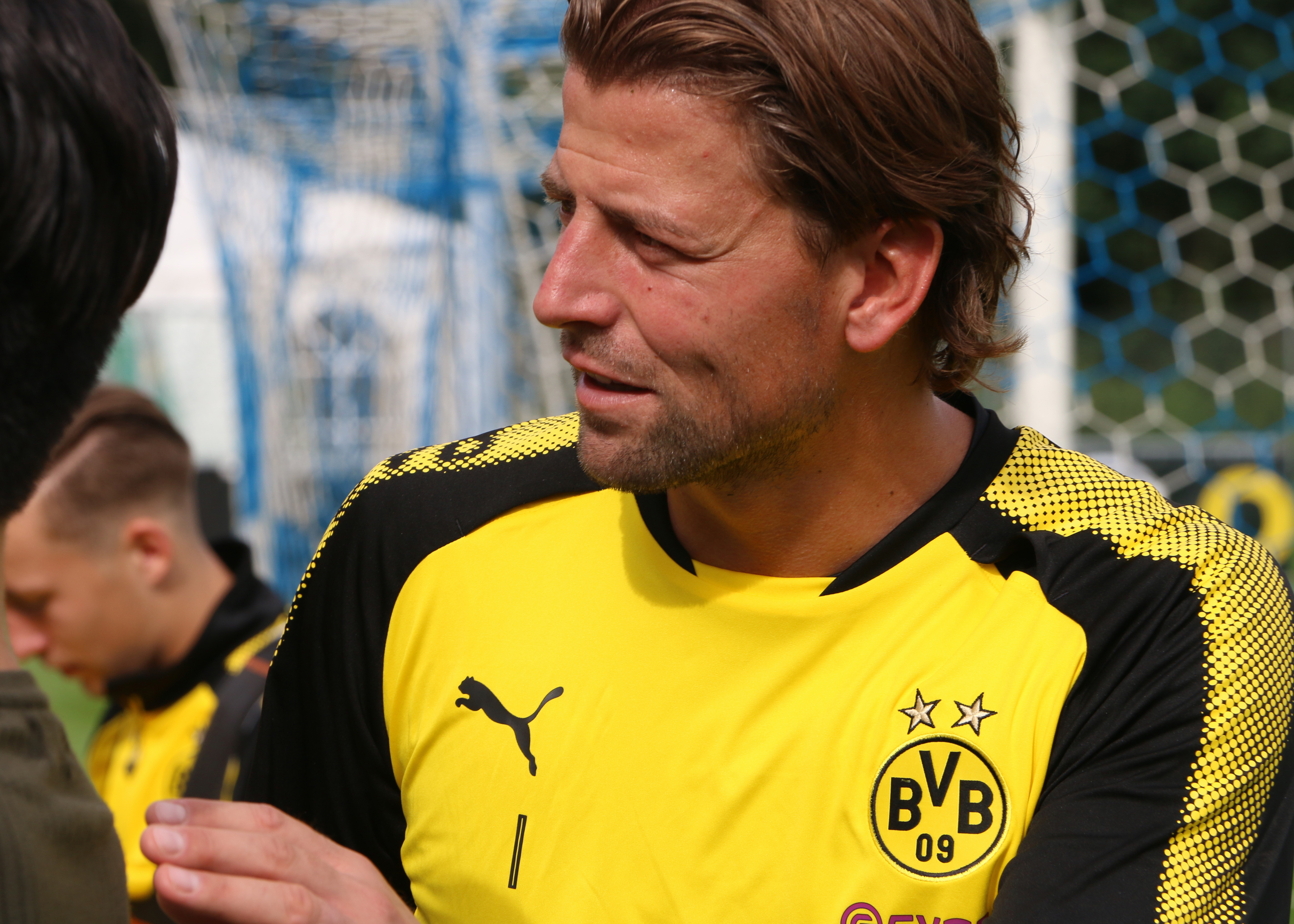 Roman Weidenfeller im BVB Trainingslager in Bad Ragaz 2017